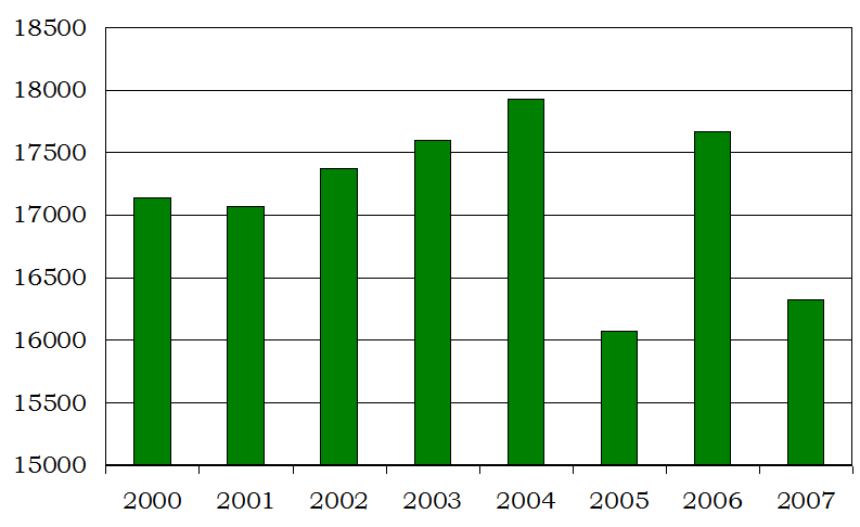 Evolución del paro en la ciudad de Valladolid